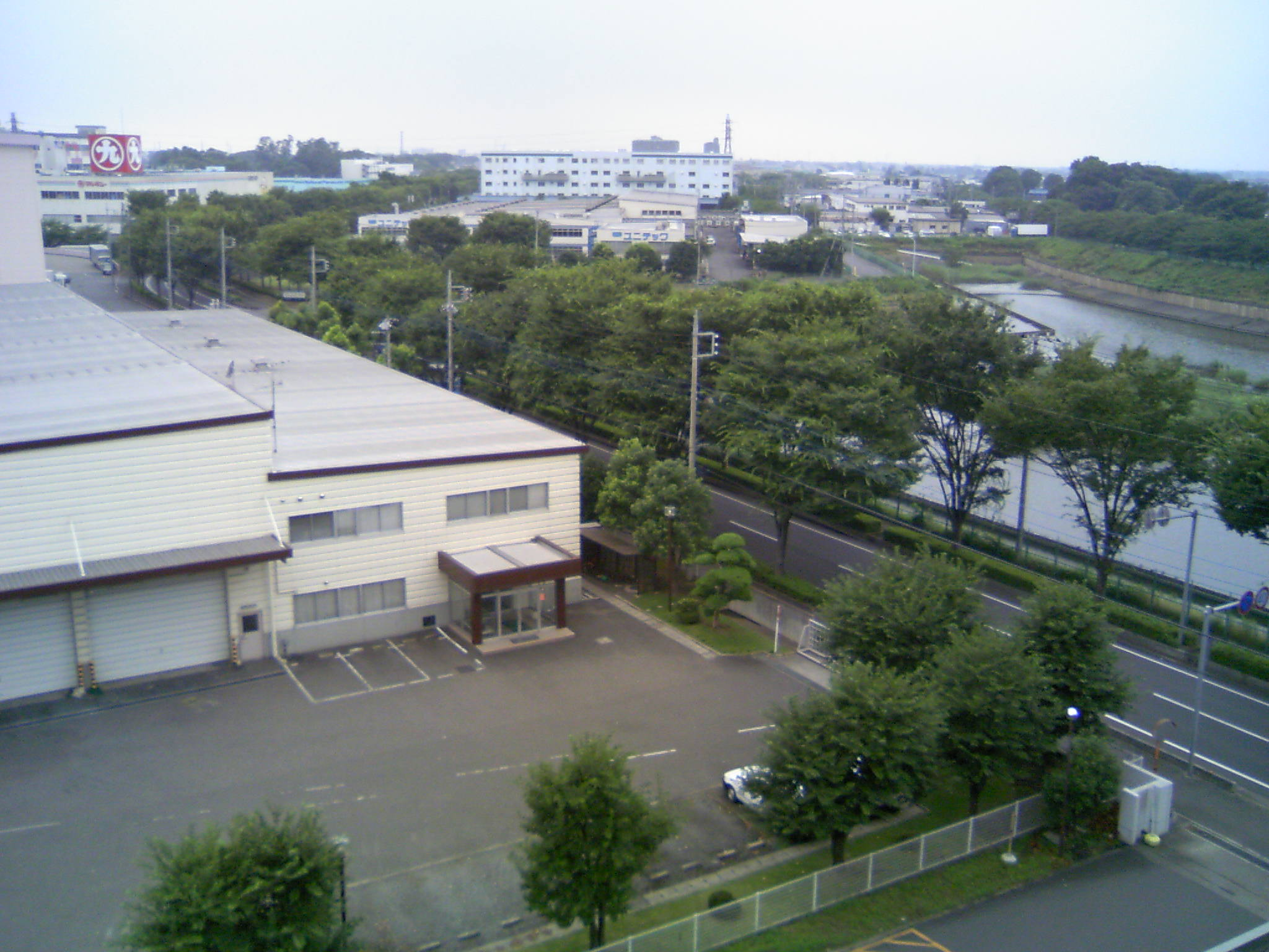 桶川東部工業団地